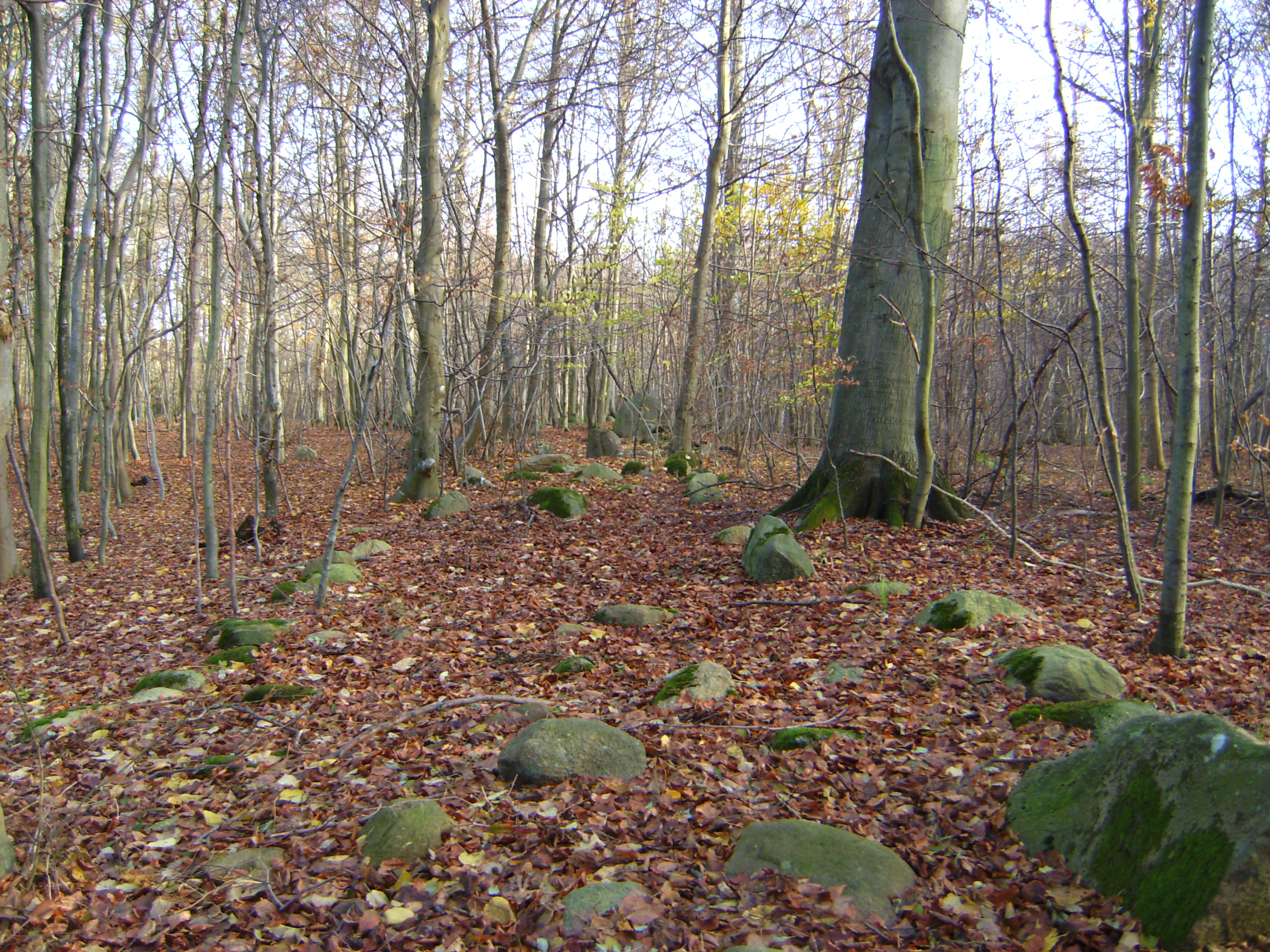 Langdysser i Frejlev Skov nord for Nysted Dolmens in a forest east of Nysted, Denmark